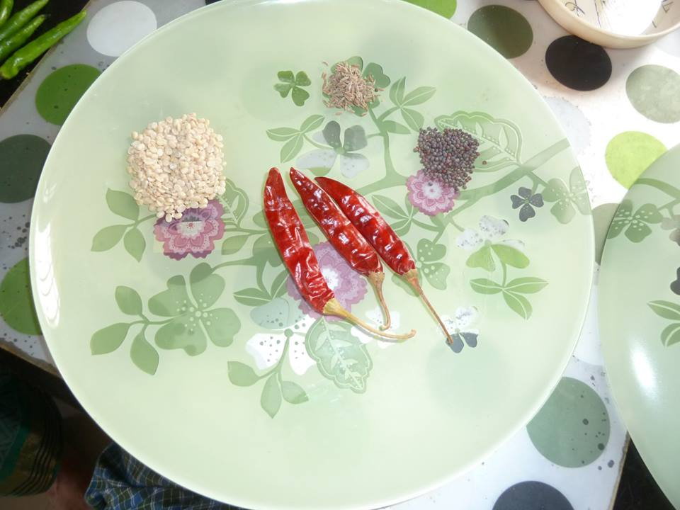 పోపు కూరకు తాలింపు సామాను